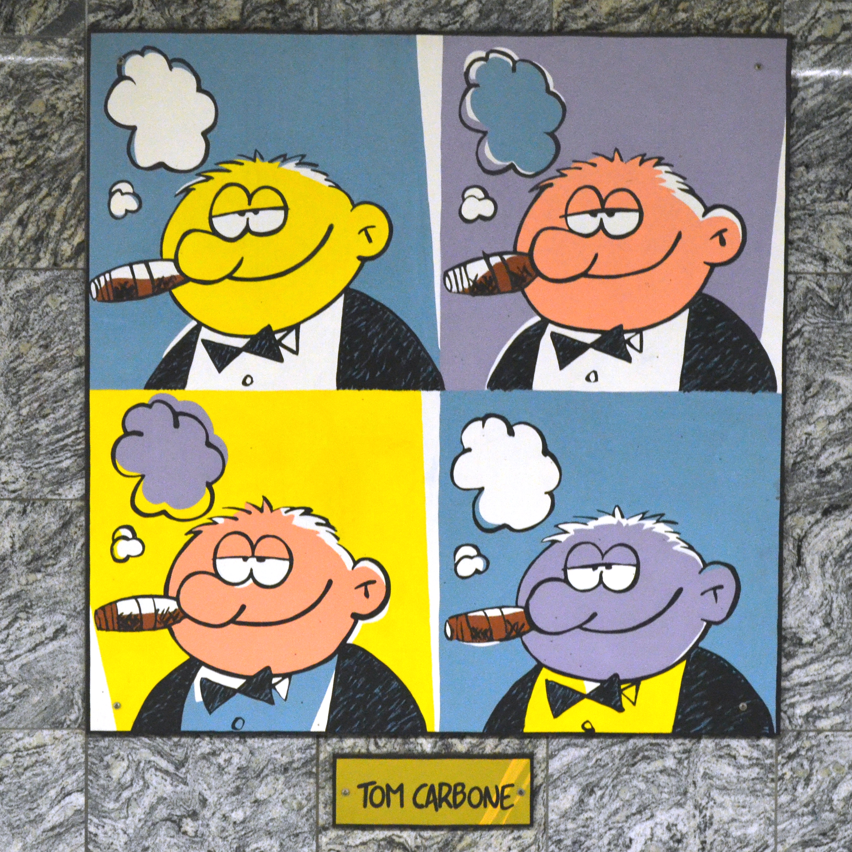 Charleroi (Belgique) - Station Janson du métro léger. Tom Carbone